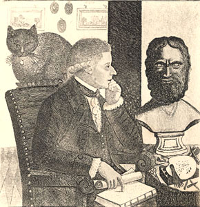 John Kay, Selbstbildnis mit seiner Lieblingskatze und Homerbüste